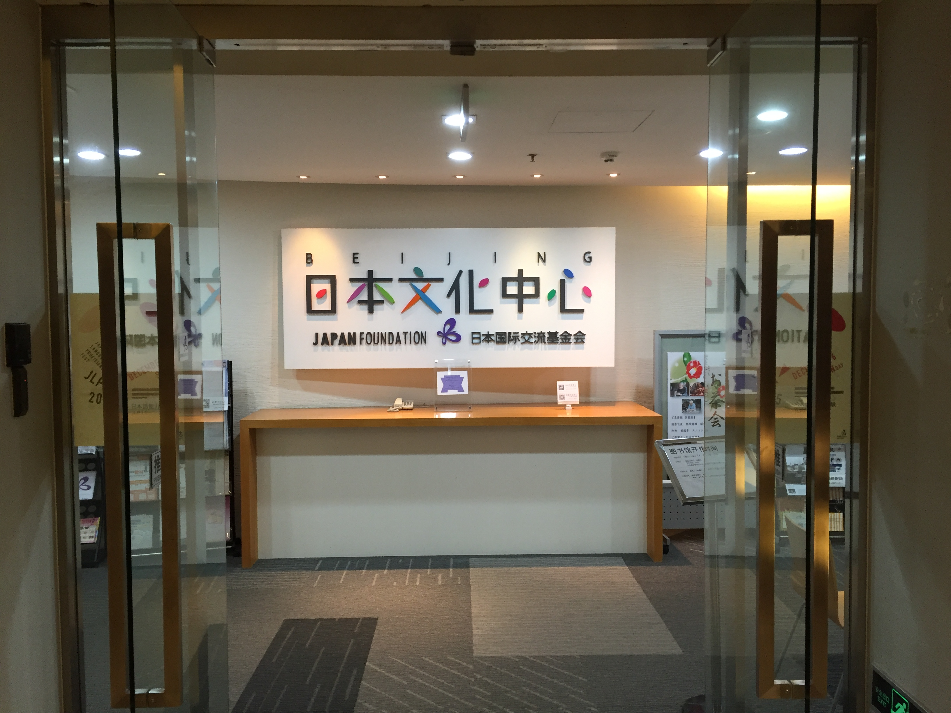 中文（中国大陆）: 日本文化中心（北京国贸SK大厦）